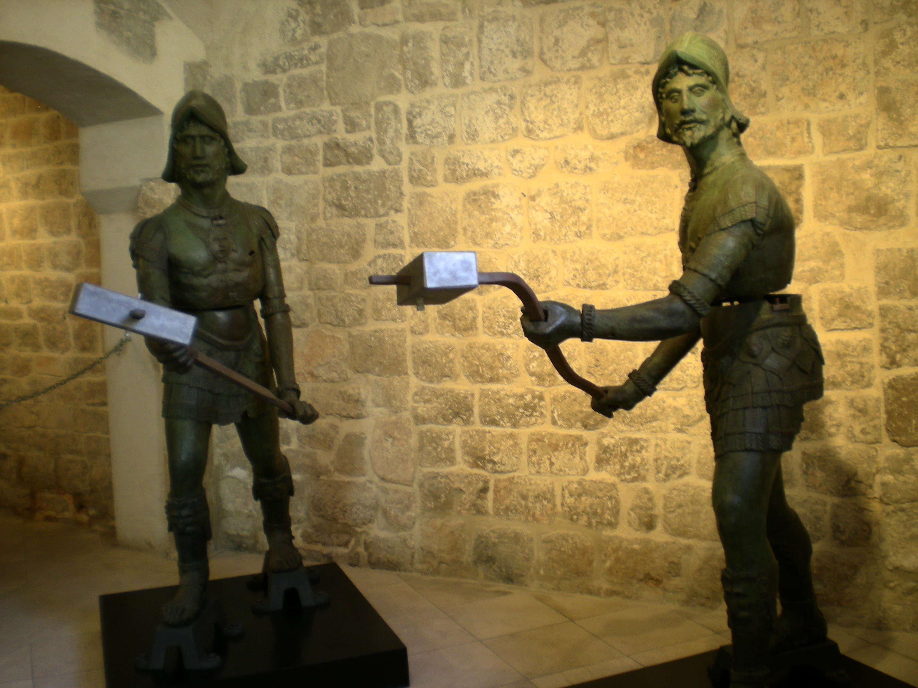 Jacquemarts en bronze (automates servant à frapper une cloche) de la tour-horloge de Dubrovnik. Ils représentent deux soldats, Maro et Baro, surnommés Zelenci (les hommes verts). Datant de 1477-1478, ils sont l’œuvre de Michelozzo. Ils sont actuellement exposés au palais des recteurs et ont été remplacés au début du XXème siècle par des copies au sommet de la tour.